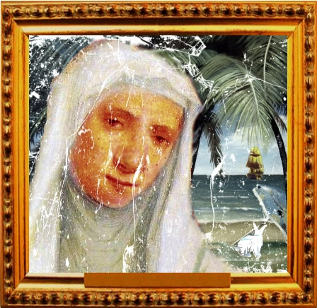 Arte Saca na Bahia, pintura da índia Aratuípe, por Rick Zucchero, 1627.